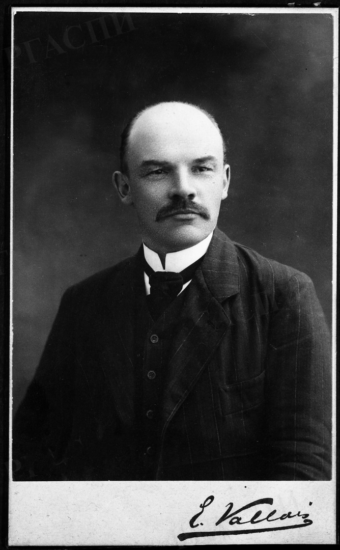 Российский политический деятель Владимир Ильич Ульянов-Ленин (1870-1924) в Париже, 1910 год